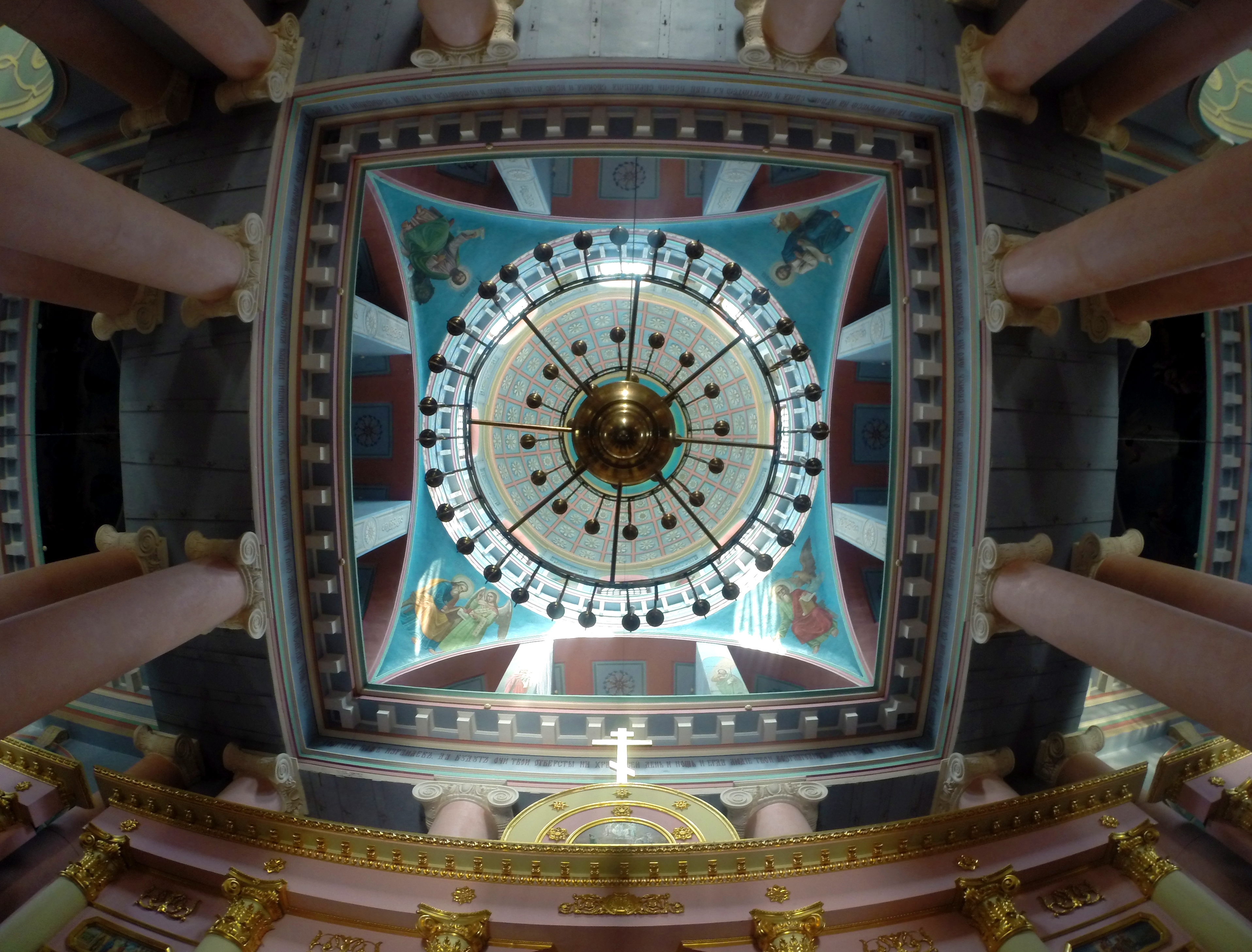 Спасо-Преображенський собор (мур.), Новгород-Сіверський, вул. Пушкіна, 1